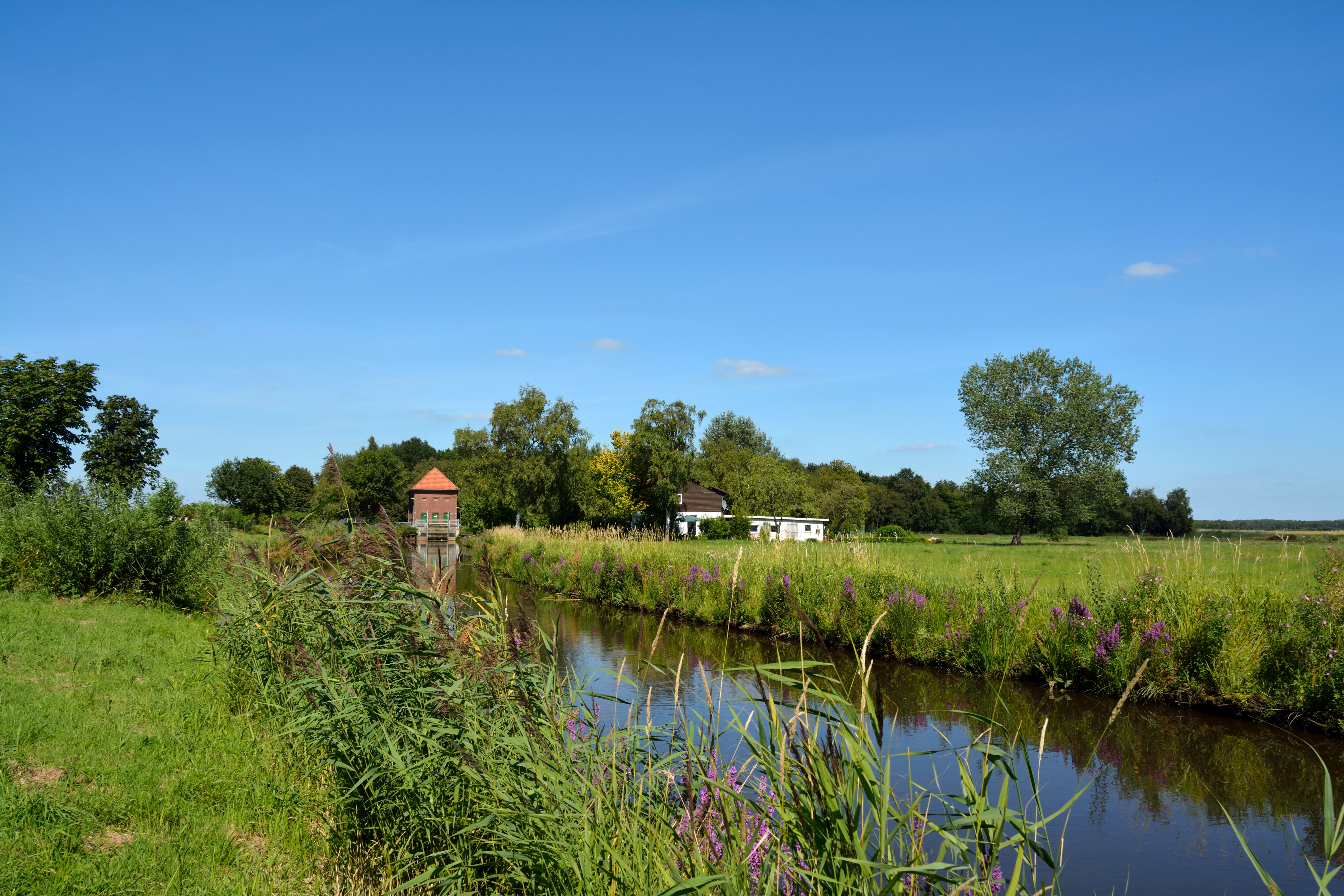 An einem Schöpfwerk am Nord-Ostsee-Kanal. Hier werden die Wilsterau und der Moorkanal zusammengefasst und in den Nord-Ostsee-Kanal geleitet.